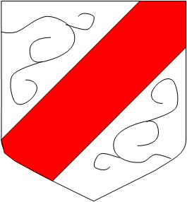 exemple de diapré